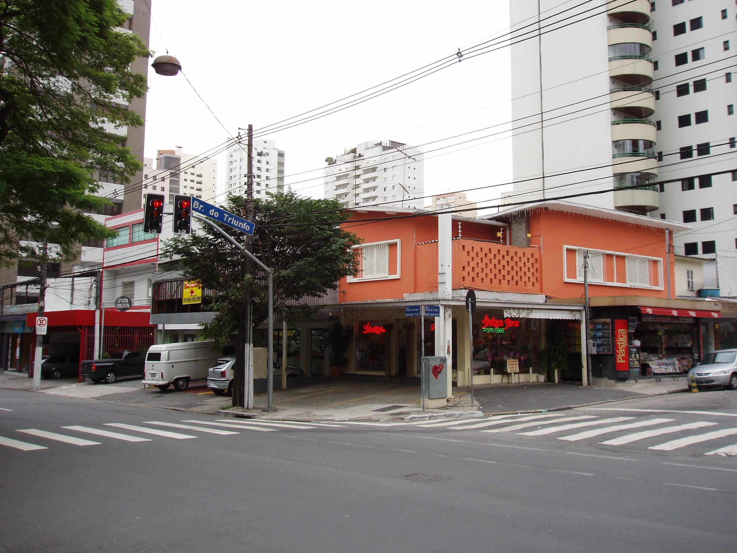 São Paulo-SP, Brasil, Rua Vieira de Morais / Barão de Triunfo